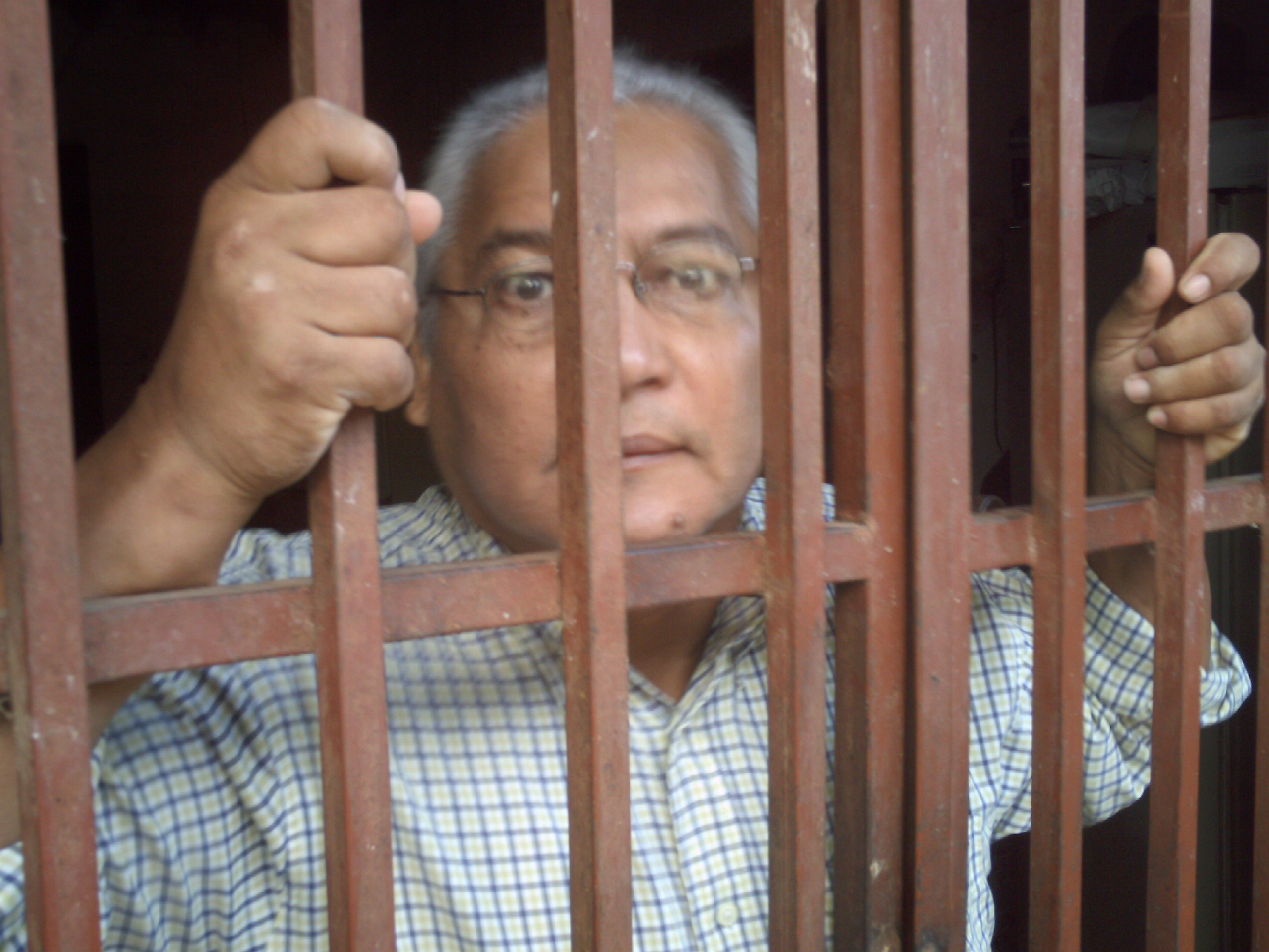 El prisionero en esta fotografía apodado Maestro, estuvo de acuerdo con la publicación de esta fotografía bajo la licencia expuesta debajo de este mensaje. Prisión del Condado de Mantras, Colombia